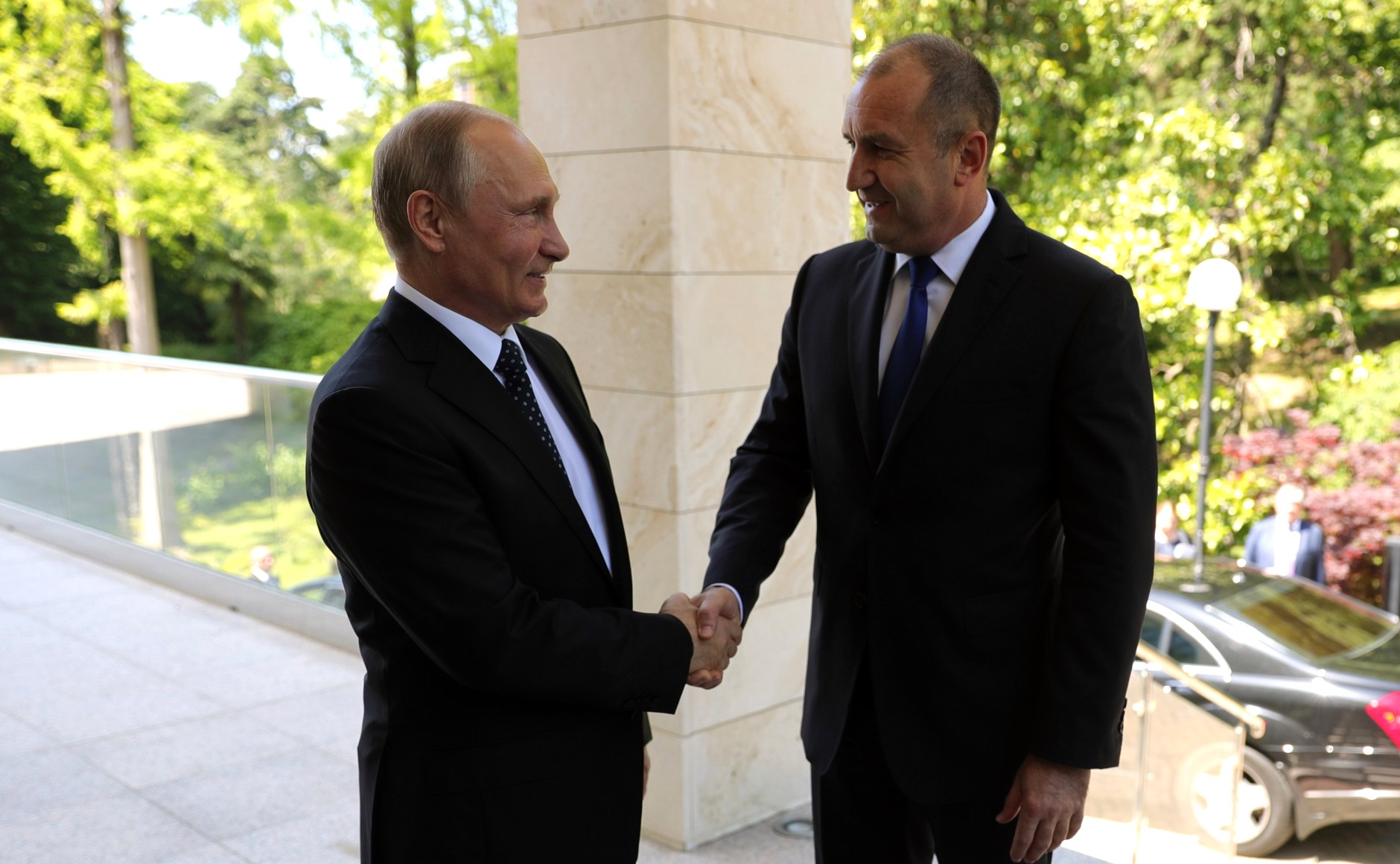 Встреча Президента России Владимира Путина с Президентом Болгарии Руменом Радевым